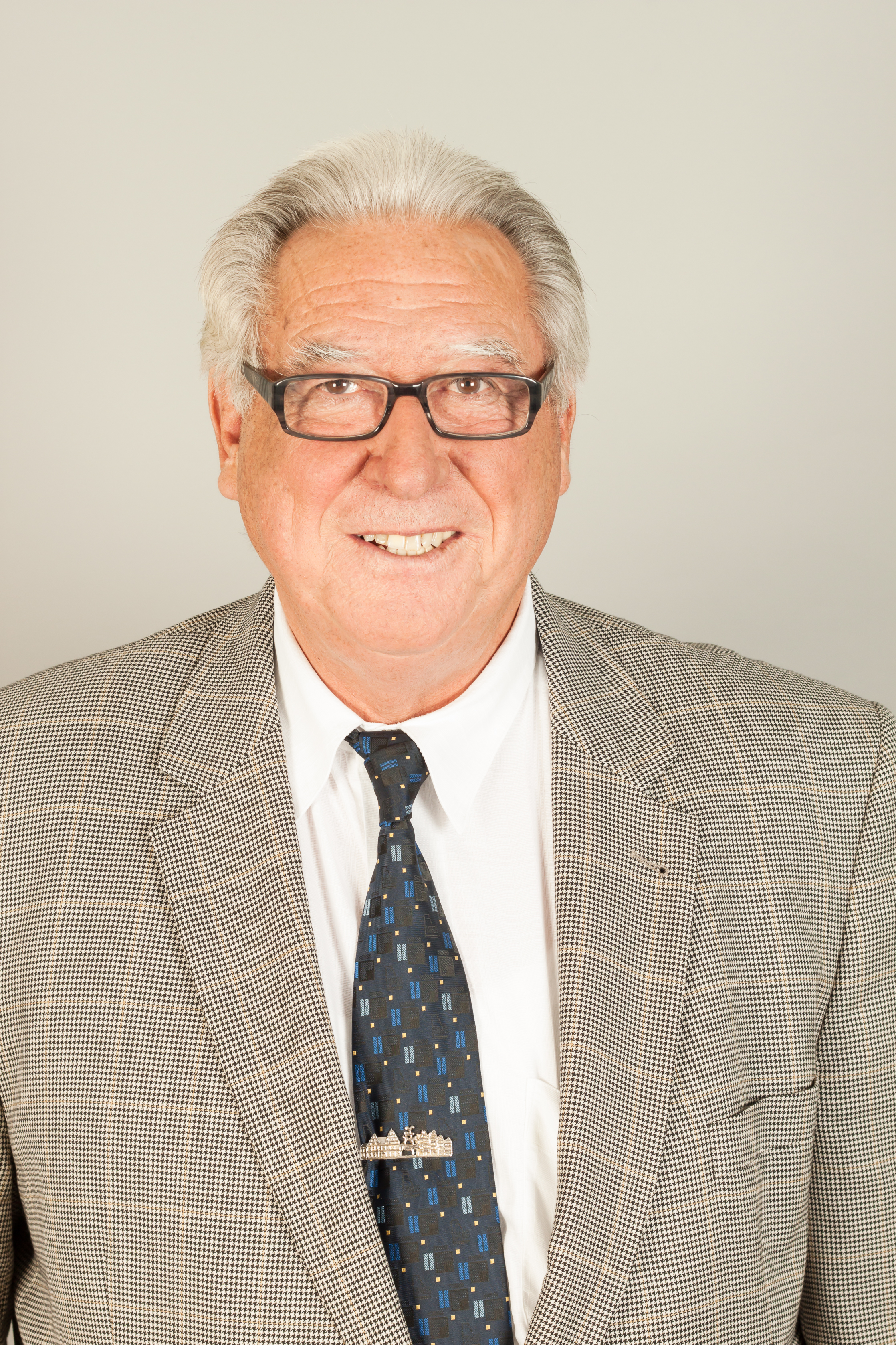 Erwin Knäpper (* 20. August 1943 in Bönen in Westfalen) ist ein deutscher Politiker (CDU) und Mitglied der Bremischen Bürgerschaft.